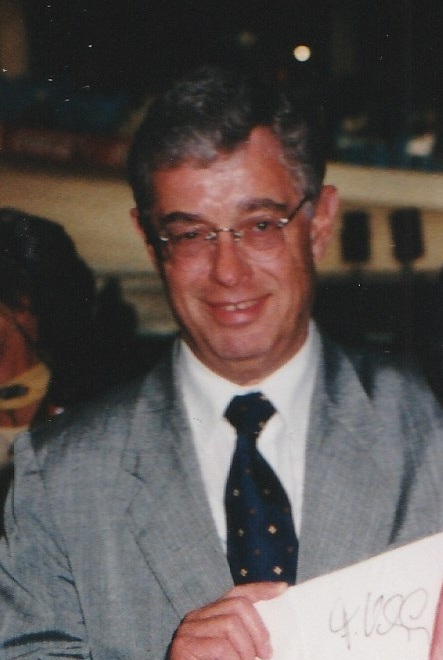 Klaus Heugel, Kölner Politiker, bei der Radsportveranstaltung "Die Freitag Nacht"